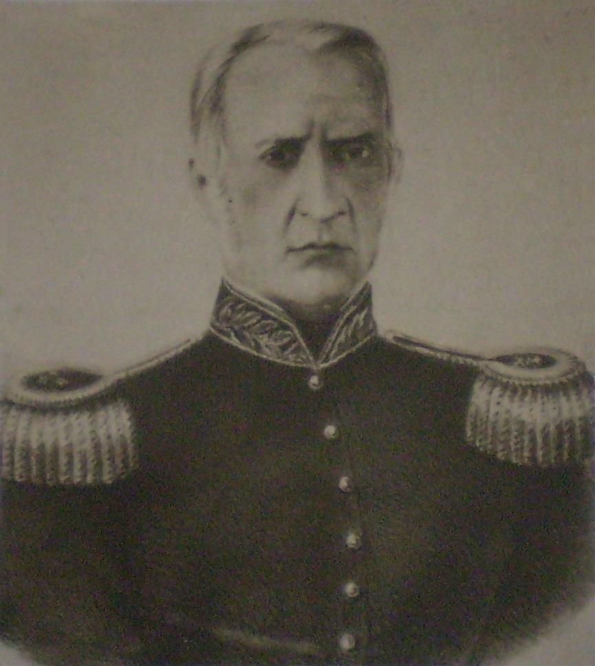 Eustaquio Díaz Vélez